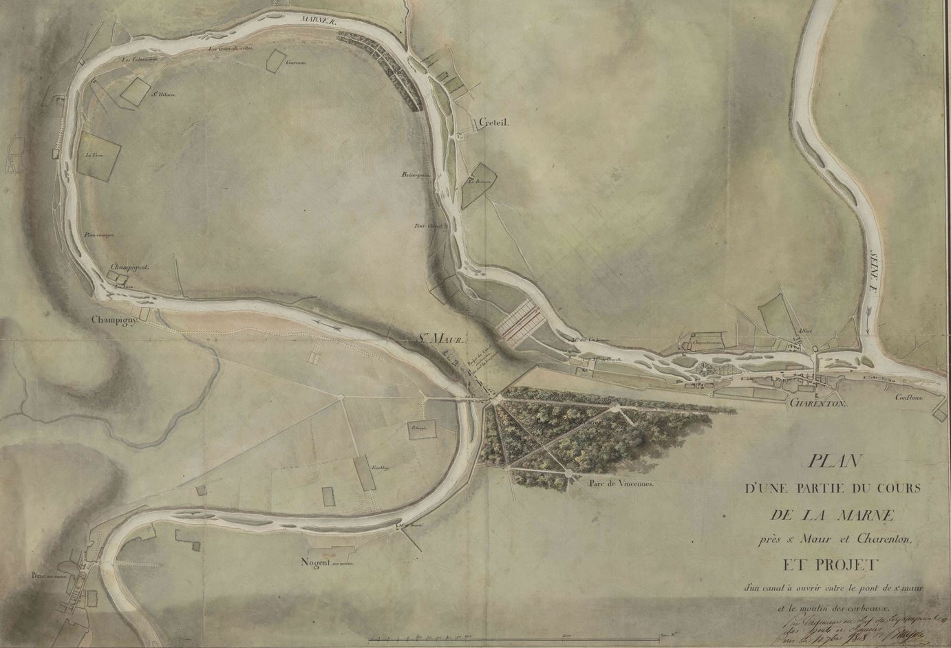 Projet d'un canal à ouvrir entre le pont de Saint-Maur et le moulin des corbeaux (1808).